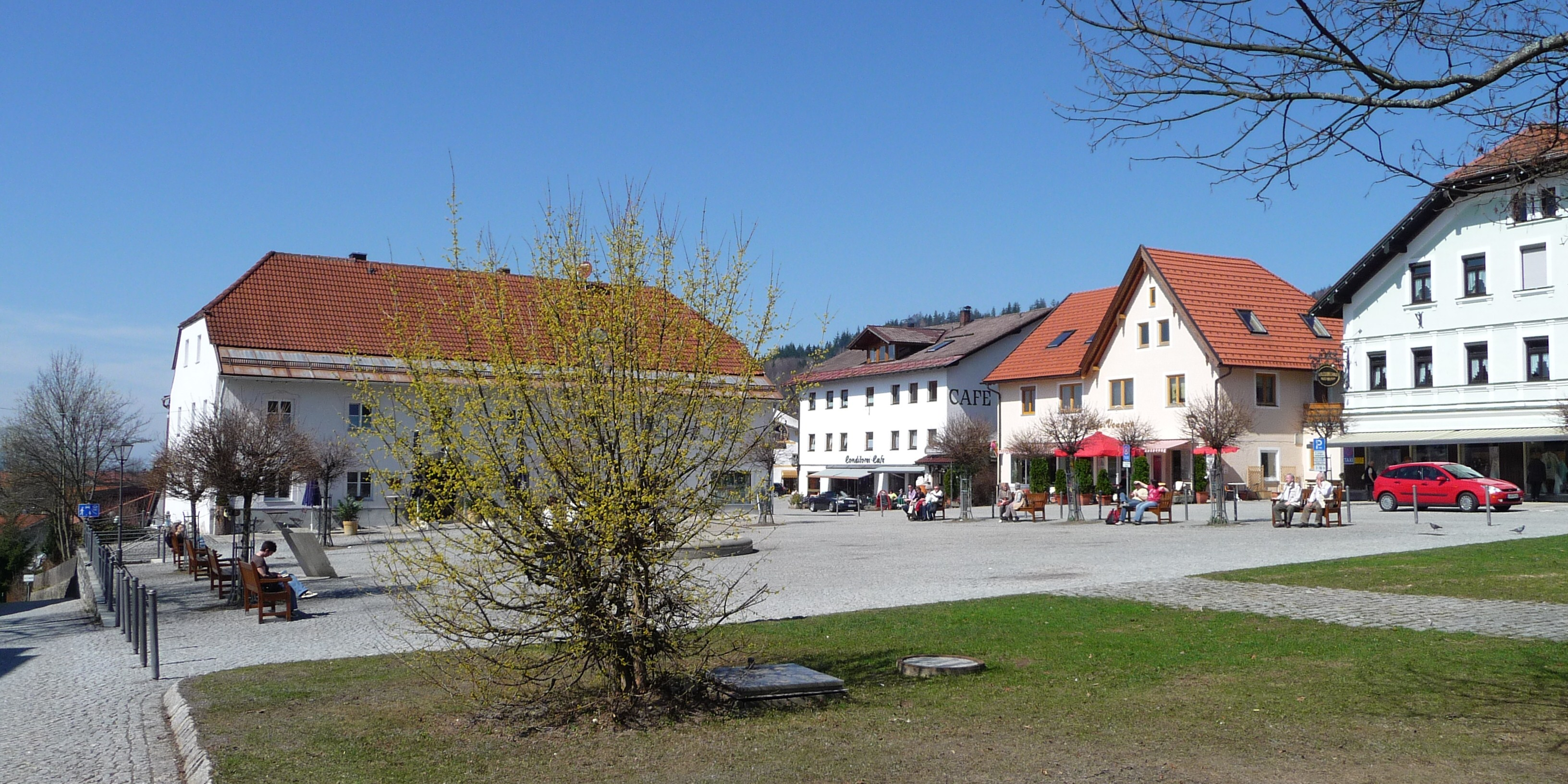 Der Marktplatz in Bodenmais